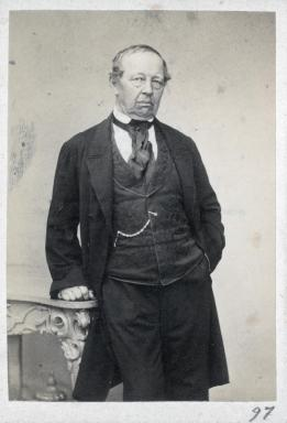 Taschek Franz